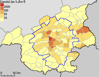 Carte des densités de population communales dans l'arrondissement de Vitry-le-François. En bleu, les limites de l'aire urbaine de Vitry-le-François. Chiffres Insee - 2007.